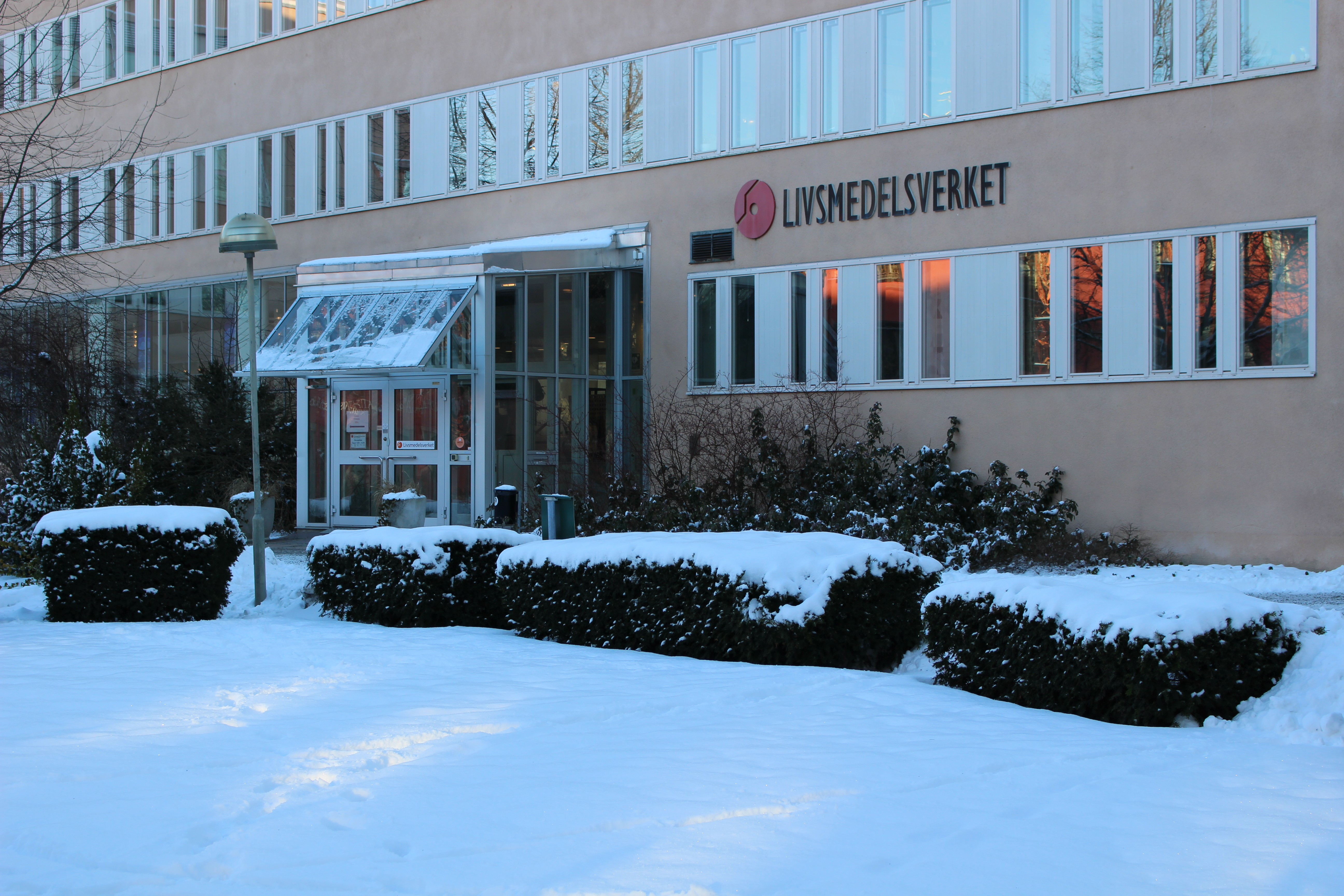 Livsmedelsverket i Uppsala